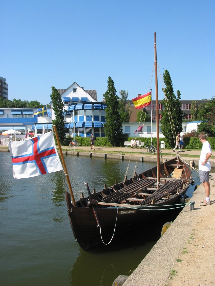 Færøbåden Naddoddur fra Tvøroyri i Slesvig 2004